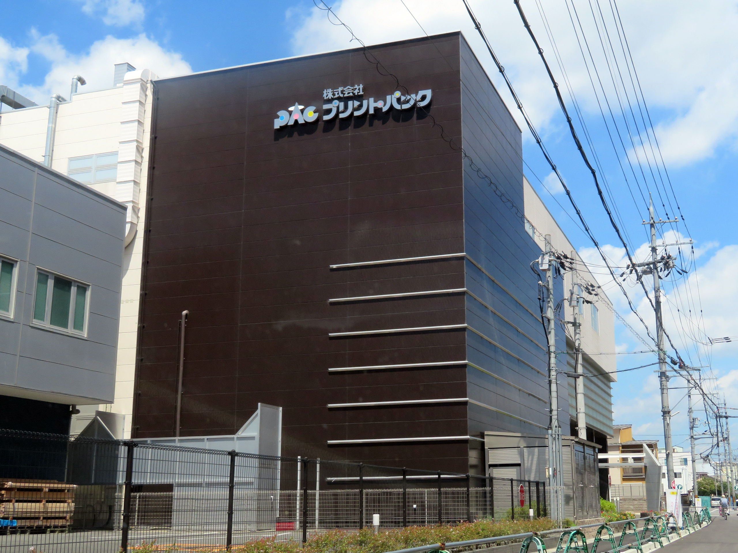 株式会社プリントパック本社を撮影。